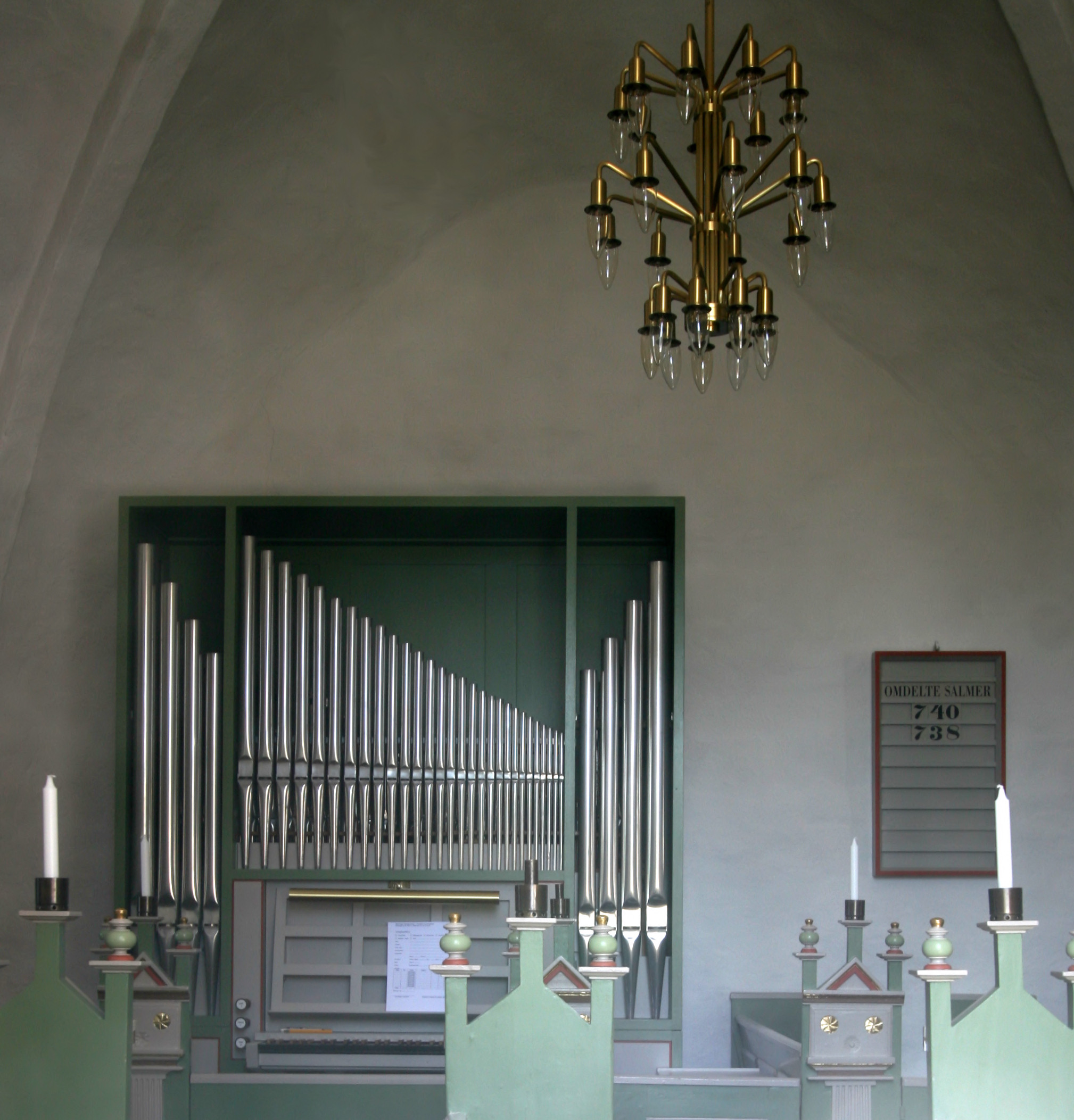 Ølsemagle Kirke, near Køge, Denmark. Organ.